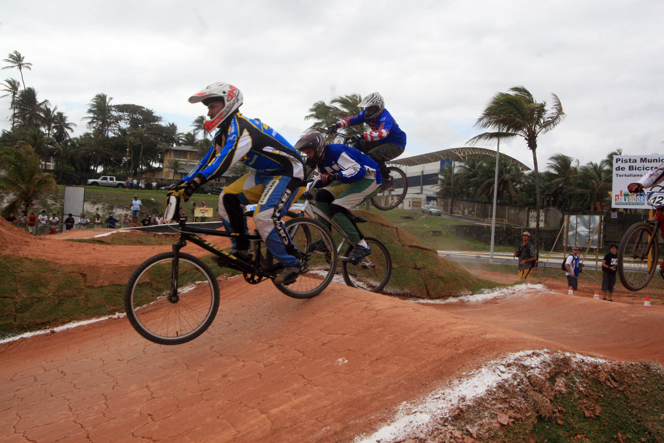 Cerca de 500 atletas de 14 estados do Brasil, divididos em 38 categorias, participaram das competições realizadas desde o último dia quatro. Foto: Aristeu Chagas / AGECOM